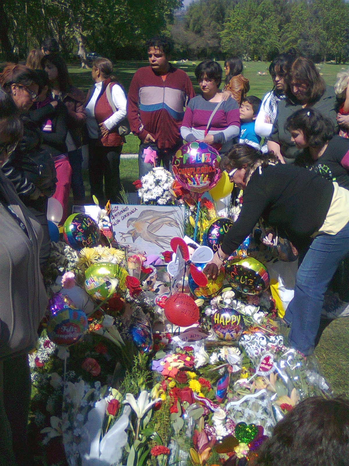 Los seguidores del presentador de TV chileno Felipe Camiroaga dejando ofrendas en su lápida con motivo de su cumpleaños. Fotografía tomada el 8 de octubre de 2011 en el sector C18 del cementerio Parque del Recuerdo, en la comuna de Recoleta.